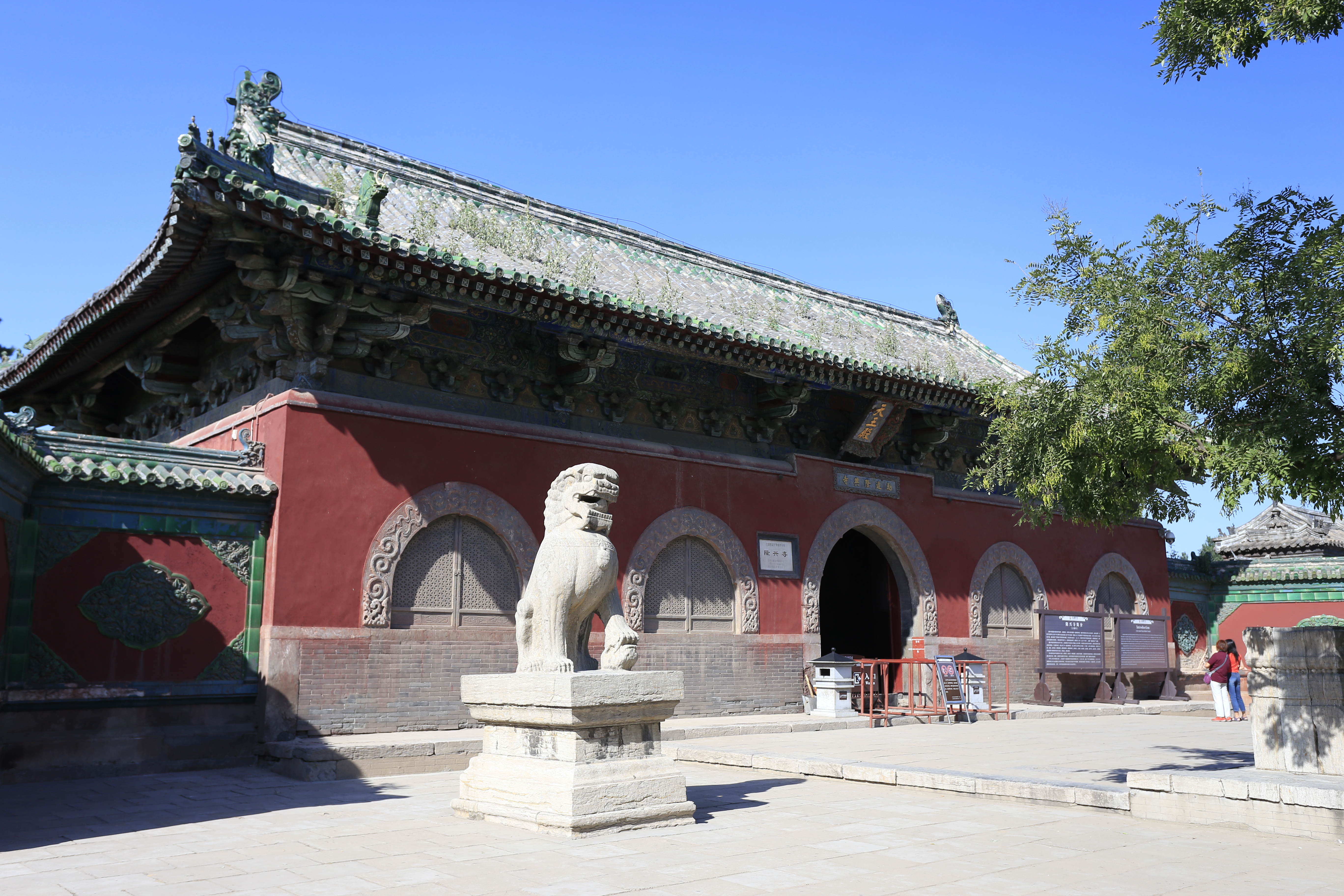 正定隆兴寺 天王殿（山门）